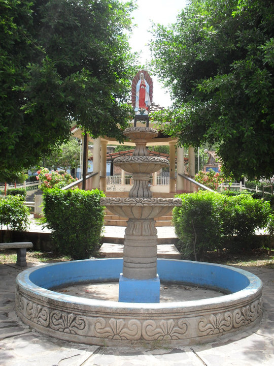 Monumento levantado en honor a la Virgen de Guadalupe patrona de Telpaneca.